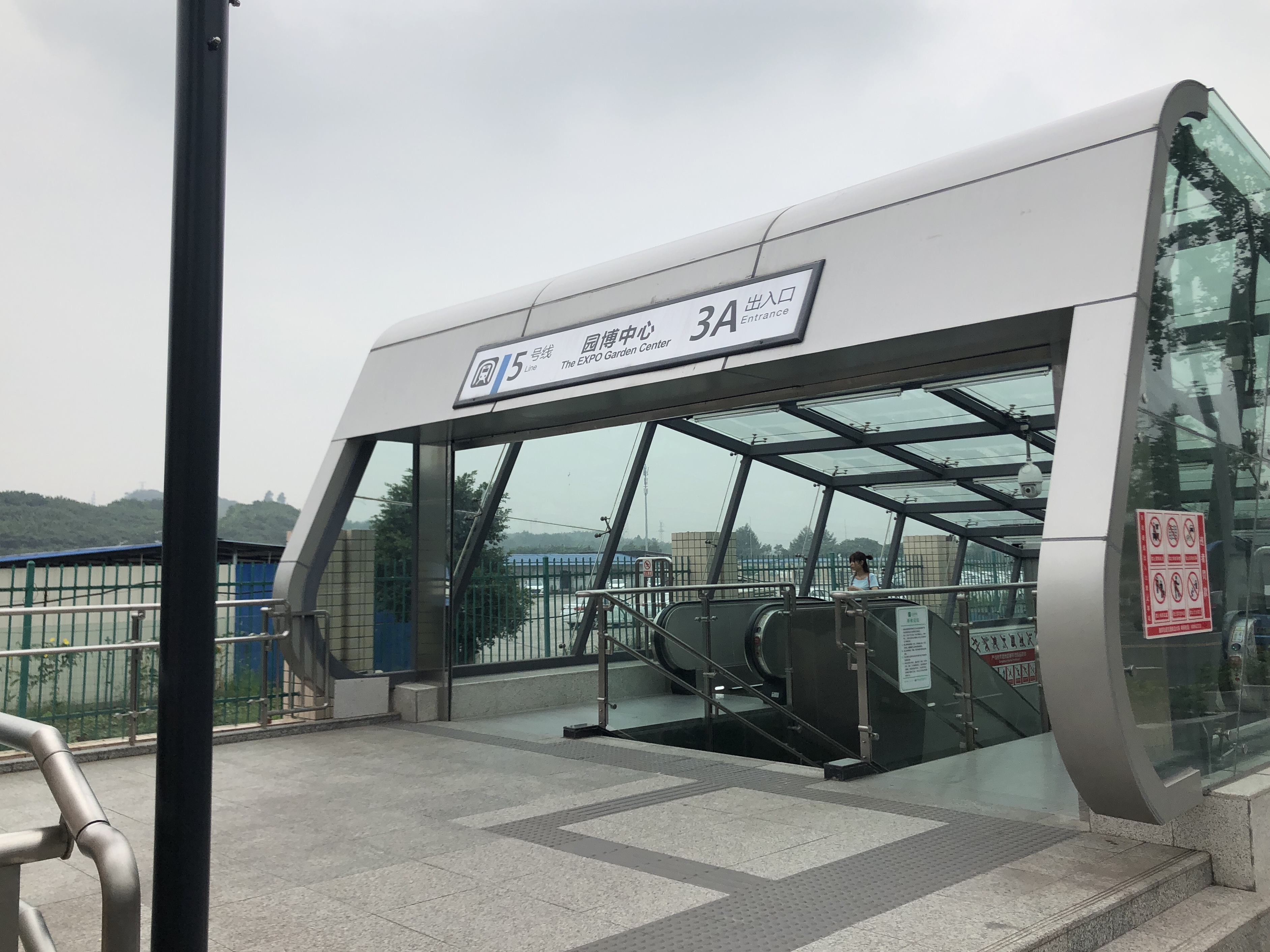 中文（中国大陆）: 5号线园博中心站3A出口